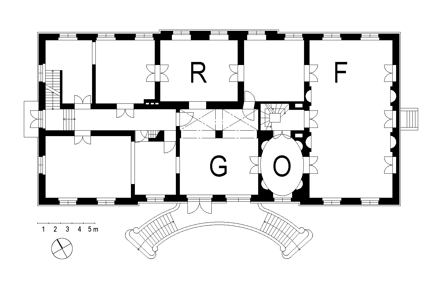 Grundriss des Palais Lichtenau in Potsdam